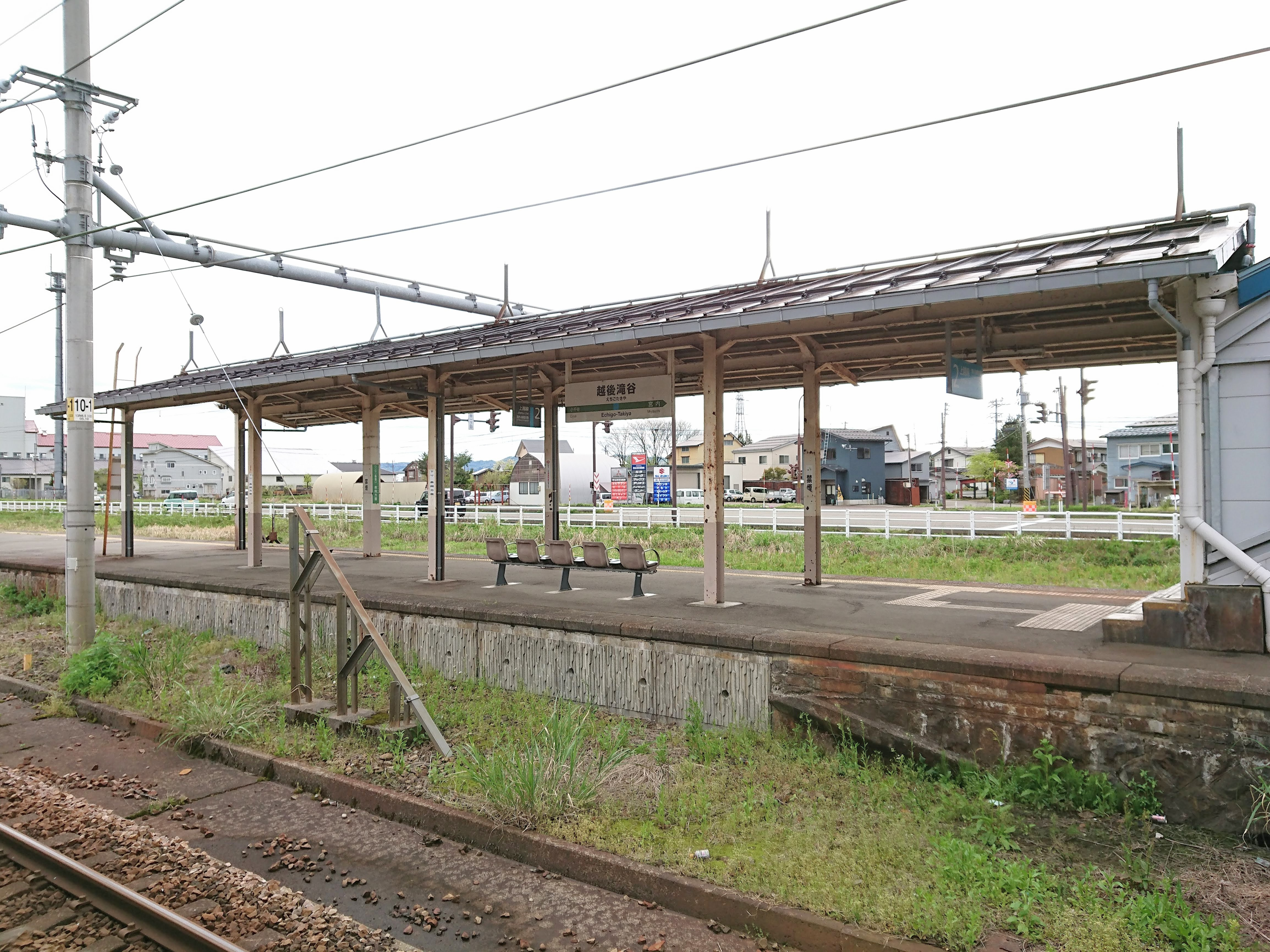 越後滝谷駅の2番線ホーム、手前側の線路は撤去されている。